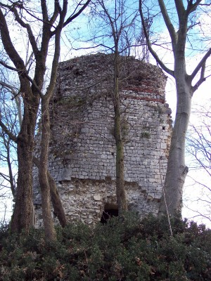 Denislotti, personale, torre pentagonale altomedievale sita sul Monte Crocetta di Arcugnano (VI), licenza libera.